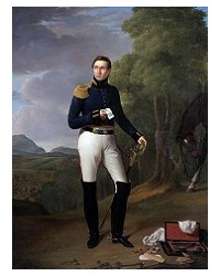 Portret van Dokter Isaac De Meyer, Joseph Ducq, MSK Gent